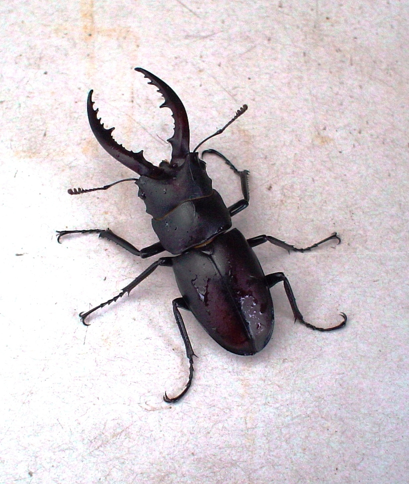 cliché personnel Spécimen pris au Japon (juin 2006). Longueur 45 mm. auteur:ruizo